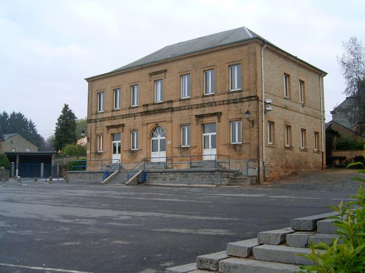 Ecole Jules Desplous de Rimogne